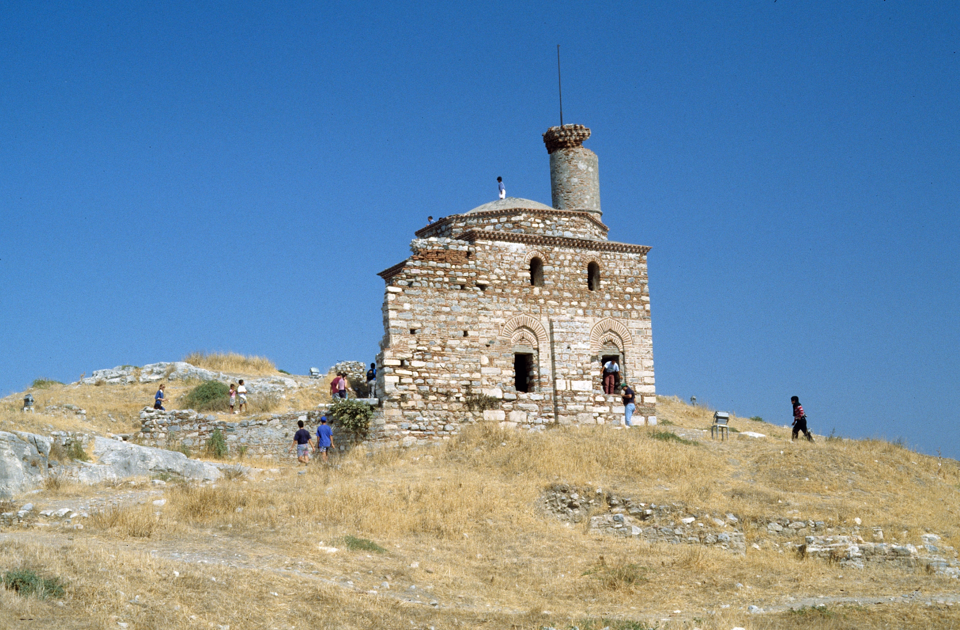 Moschee in der Zitadelle von Selçuk, Westtürkei